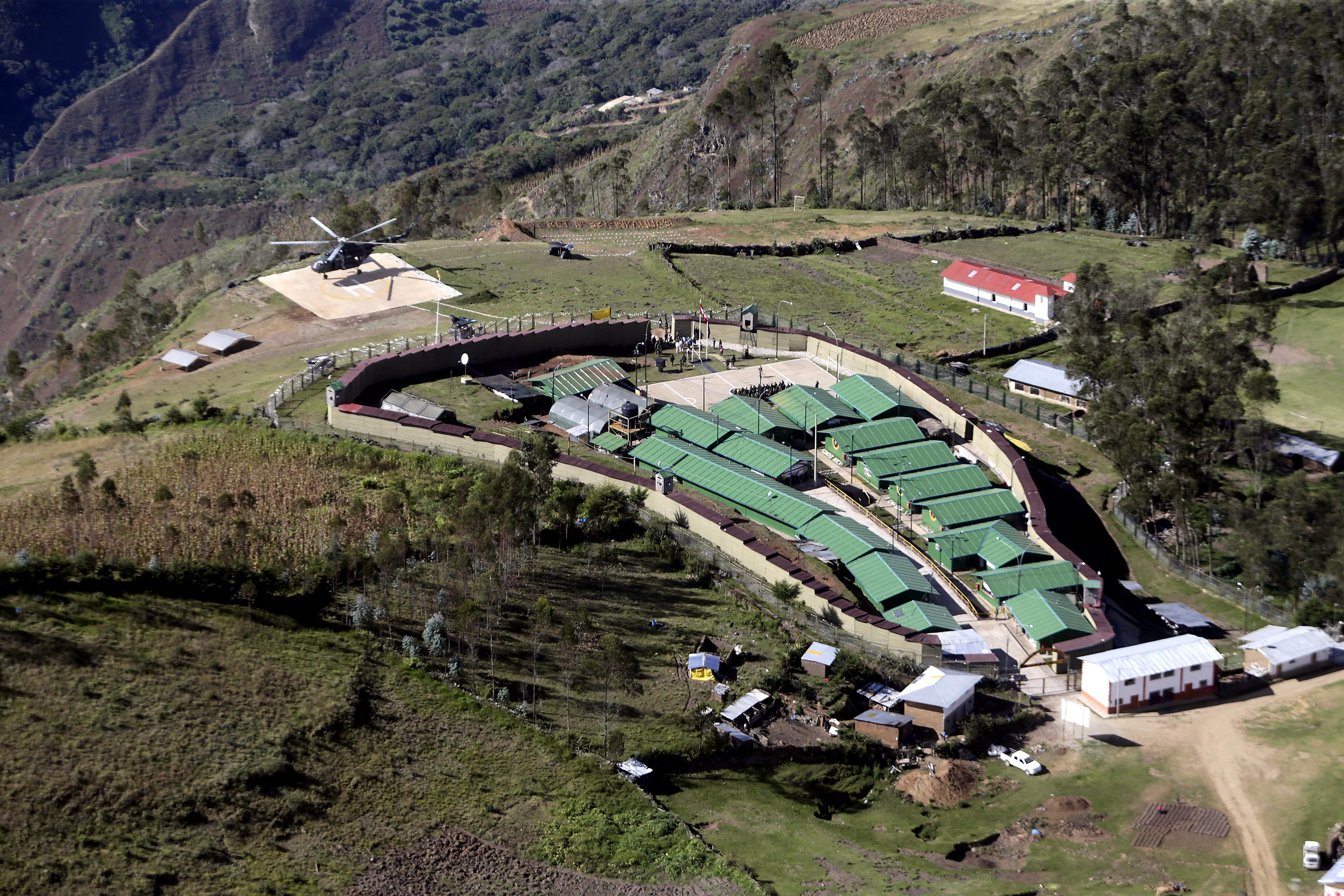 El ministro de Defensa, Pedro Cateriano Bellido, cumplió una visita de inspección a las bases contraterroristas ubicadas en el Valle de los Ríos Apurímac, Ene y Mantaro (VRAEM) donde comprobó las condiciones óptimas en que se desempeñan nuestros soldados. Acompañado del comandante general del Ejército, General Ronald Hurtado Jiménez, el titular del sector arribó a las bases de Mazamari, Pichari e Incahuasi, en las regiones Junín y Cusco. En Incahuasi, el ministro verificó las nuevas instalaciones y el correcto desempeño del personal asignado en esta base militar, desde donde se logrará control territorial en la zona. También se supervisaron las operaciones militares que se realizan en Mazángaro y Unión Mantaro, puntos claves en el VRAEM y rutas de tránsito del narcotráfico. El ministro Cateriano anunció que el gobierno reforzará la estrategia contraterrorista con importantes adquisiciones. “A fines de este año llegarán ocho nuevos helicópteros para servir en esta zona. Se trata de una geografía agreste donde el principal vehículo de transporte es el helicóptero, y las Fuerzas Armadas lo requieren”, mencionó. Finalmente, adelantó que el gobierno construirá cuatro nuevas bases contraterroristas y la Fuerza Aérea adquirirá seis radares, destinados a reforzar la lucha contra el terrorismo, narcotráfico y otras amenazas.